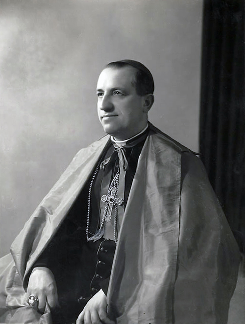 CORRADO URSI (1908 – 2003), Cardinal Corrado Ursi nel 1956 come Vescovo di Nardò